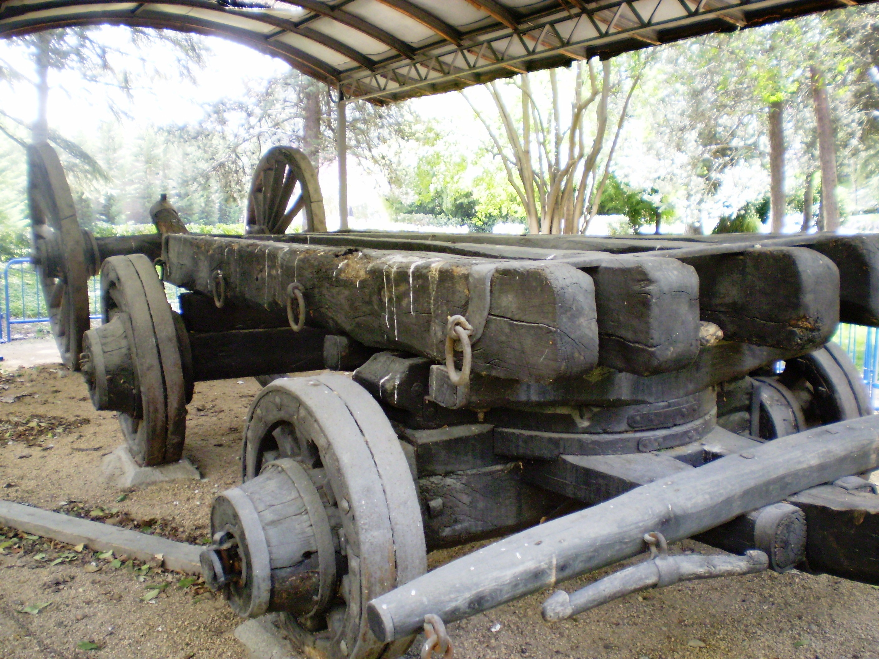 Museo de Carruajes, in Campo del Moro, Madrid, Spain